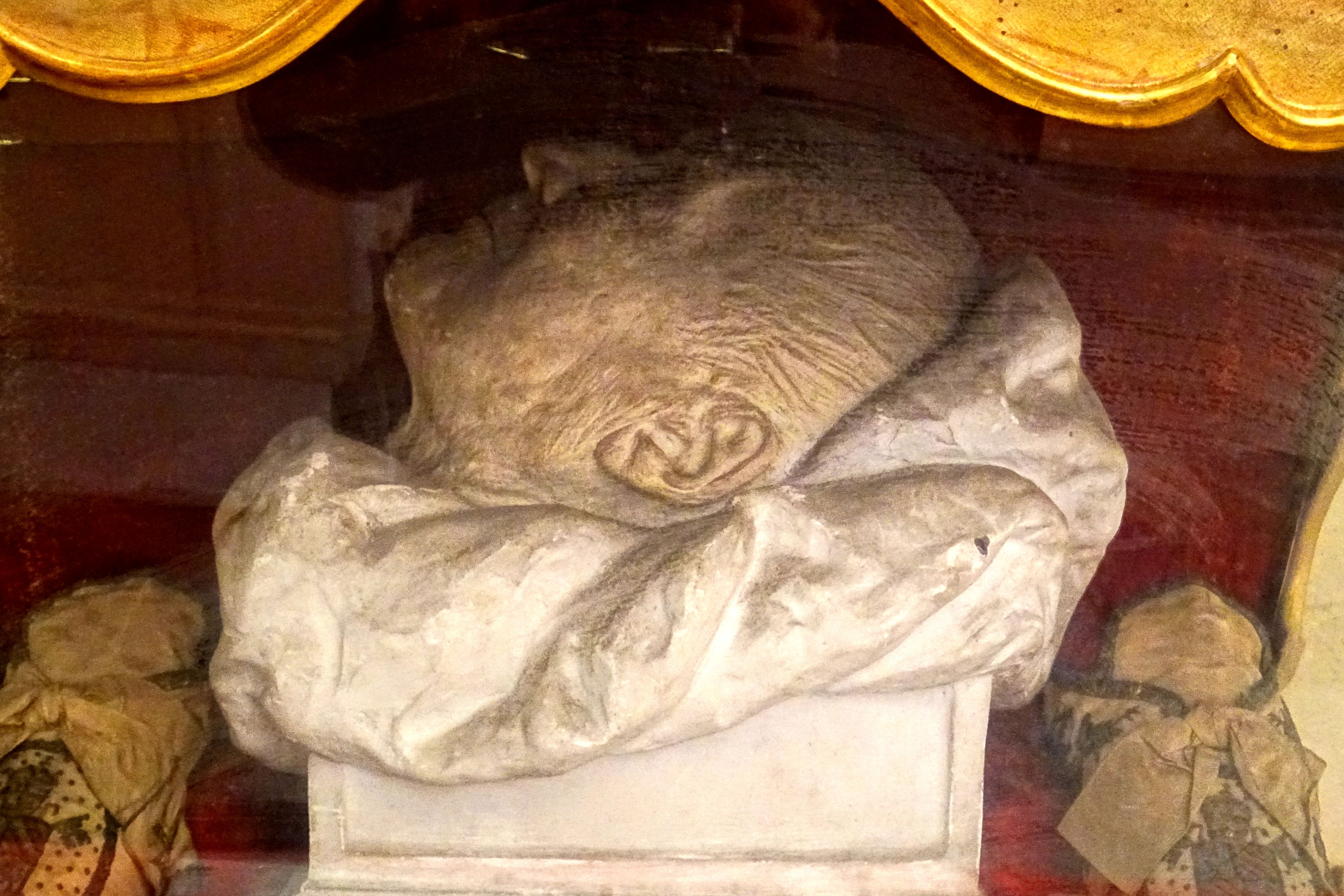 Masque funéraire du pape Pie IX.